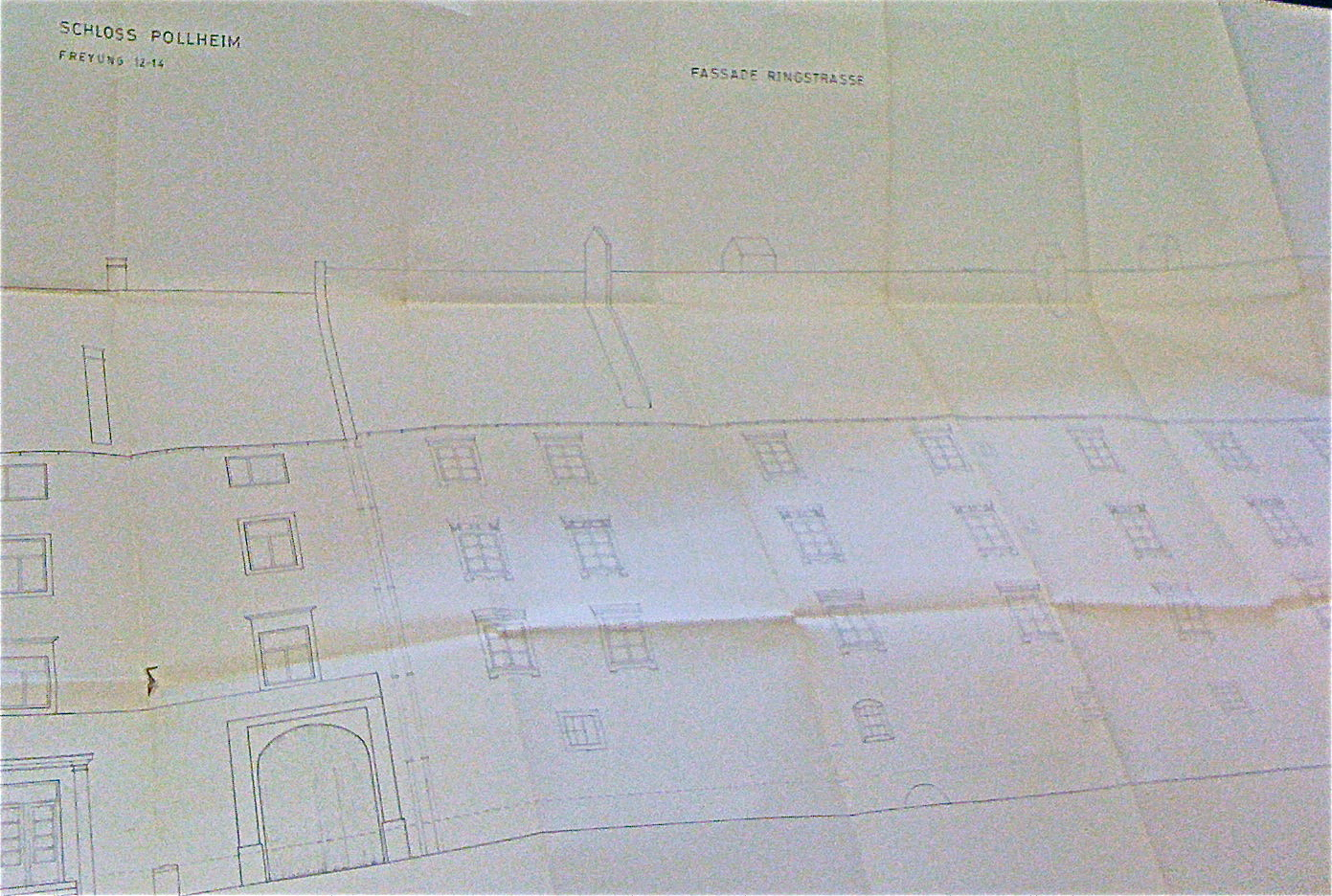 Bauplan-Freyung 12-14; Fassade Ringstraße